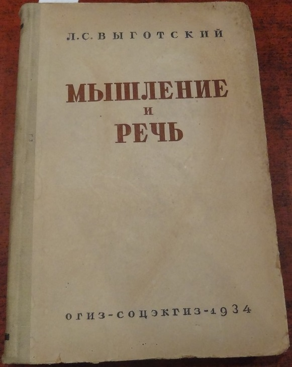 L.S.Vygotskij - Myšlenie i reč - 1934